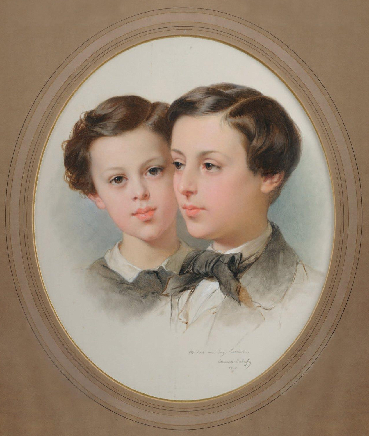 Jean Frédéric André Poupart, baron de Neuflize, et son frère